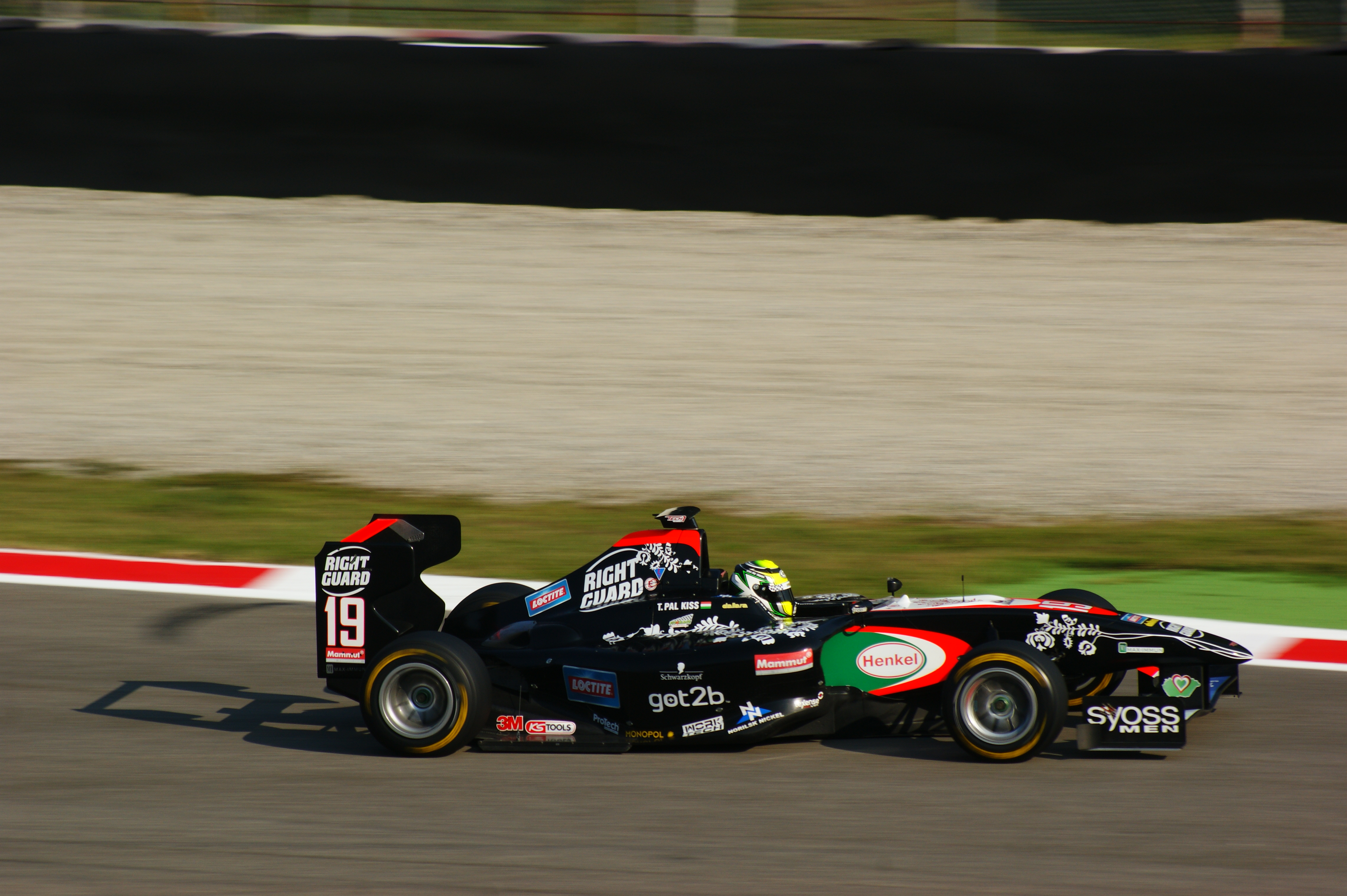 Tamás Pál Kiss alla variante Ascari Monza 2011